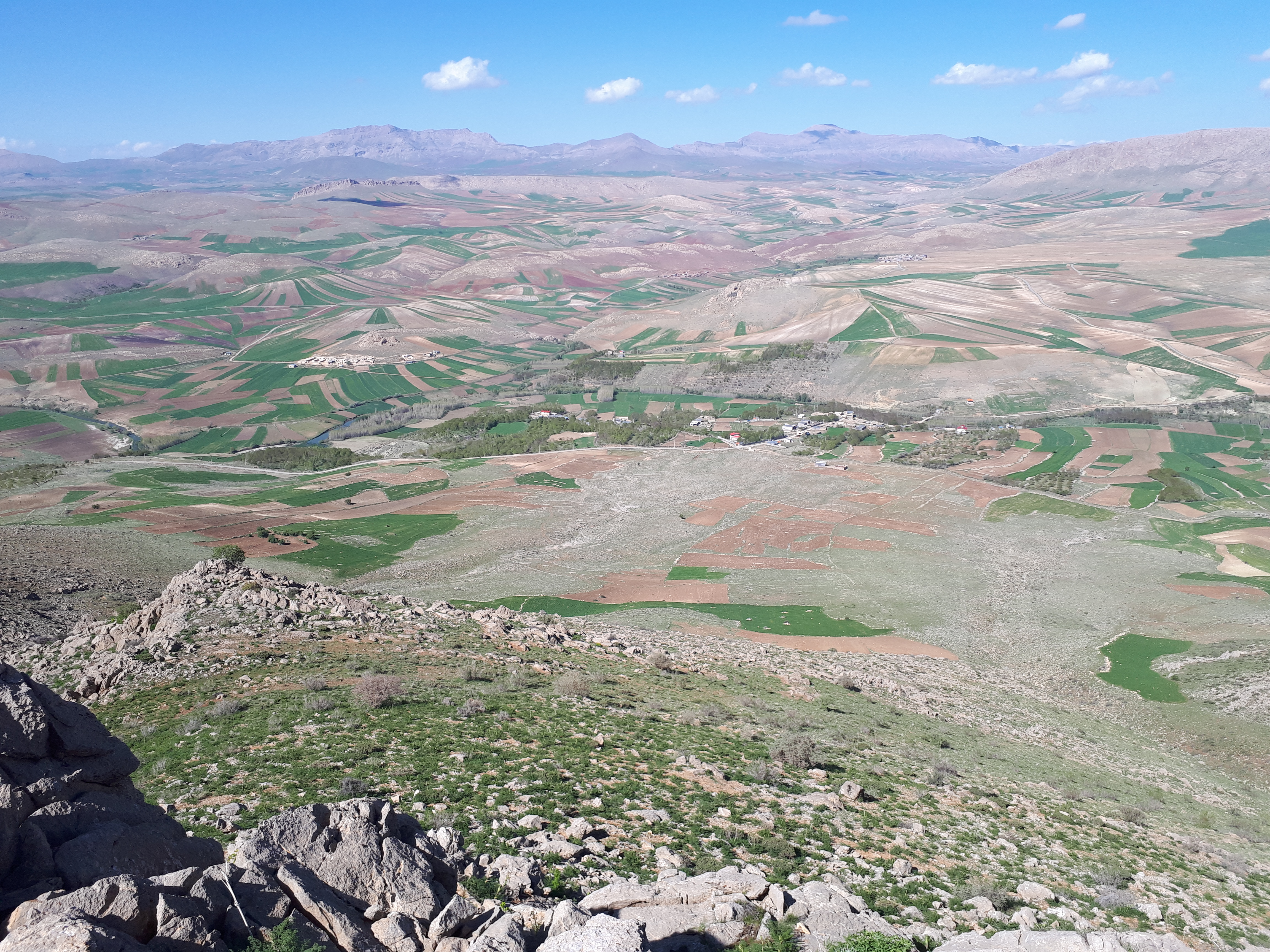 موقعیت روستای سنگ کر از ارتفاع میانه کوه گل انداب روستا